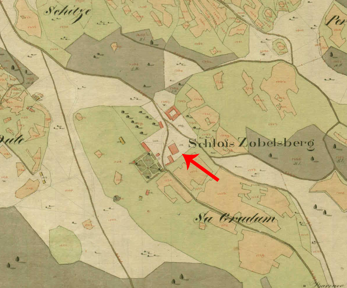 Franciscejski kataster za Kranjsko, 1823-1869